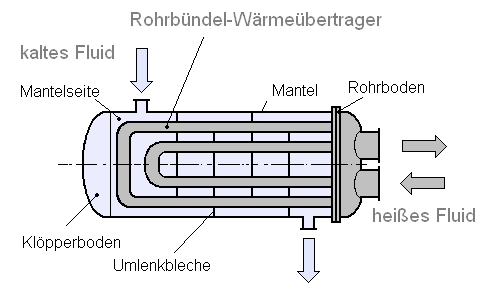 Rohrbündelwärmeübertrager